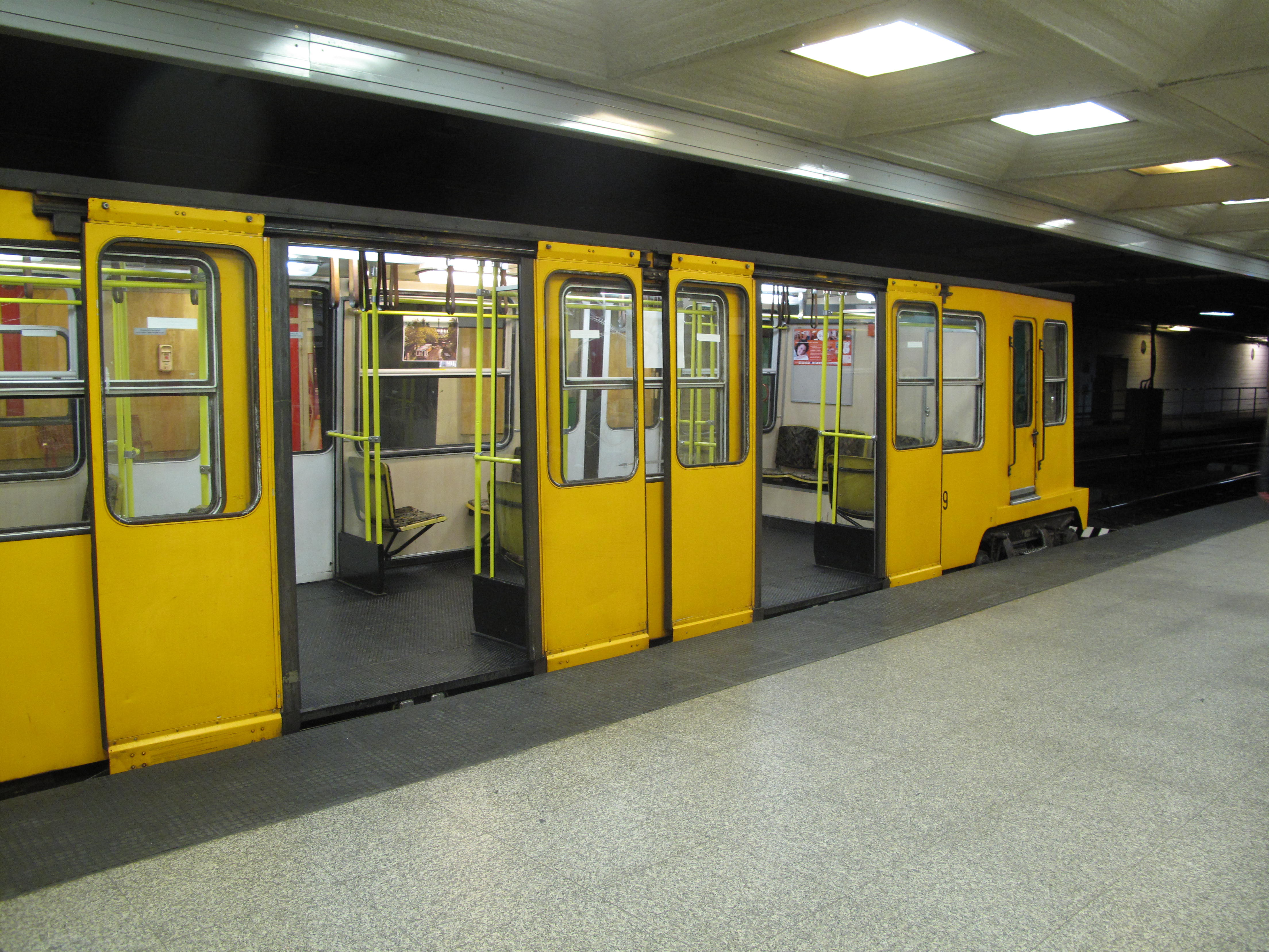 Budapešť